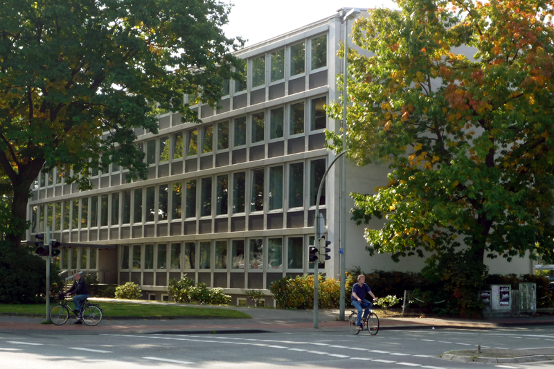 Gütersloh, Amtsgericht This is a photograph of an architectural monument. 089